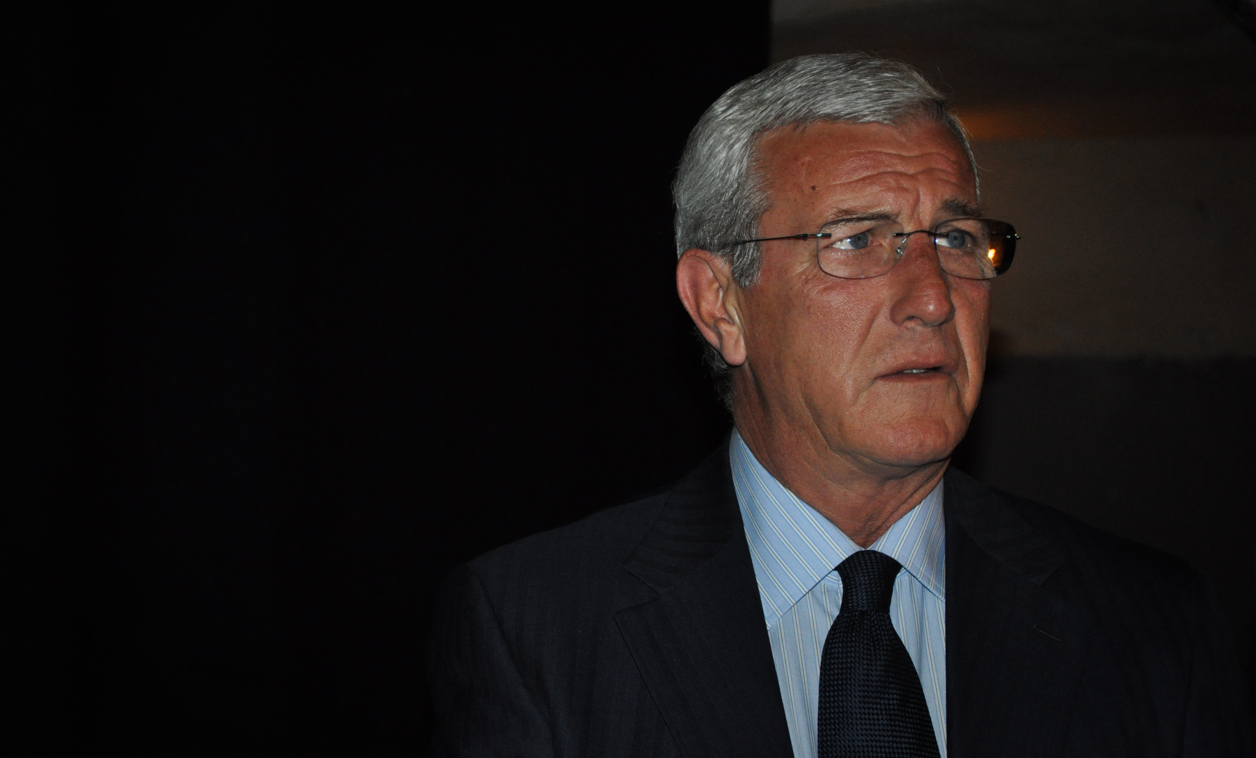 Marcello Lippi al Festival Internazionale del Giornalismo di Perugia.